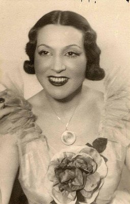 Makay Margit (1891-1989) kb. 20-22 éves korában